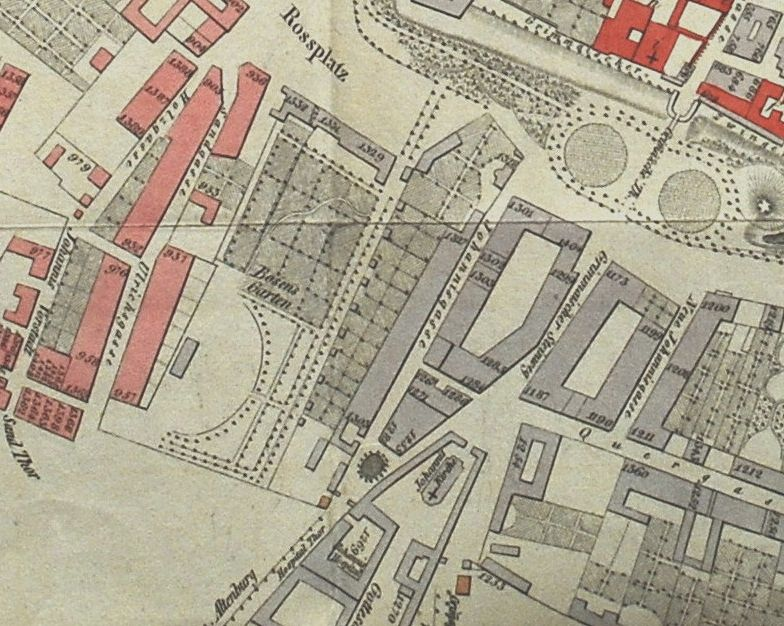 Lage des Großbosischen Gartens. Ausschnitt aus dem Stadtplan von Leipzig von 1823 Oben links der Roßplatz, oben rechts der Augustusplatz und davon abgehend der Grimmaische Steinweg Richtung Johannisplatz mit Johanniskirche. Ebenfalls eingezeichnet die Johannisgasse, die zu dieser Zeit noch direkt bis in die Stadt hinein führte. Die heutige Goldschmidtstraße gibt es zu diesem Zeitpunkt noch nicht, sie verläuft also auf dem Gelände des ehemaligen Großbosischen Gartens.